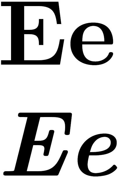 Latin letter E